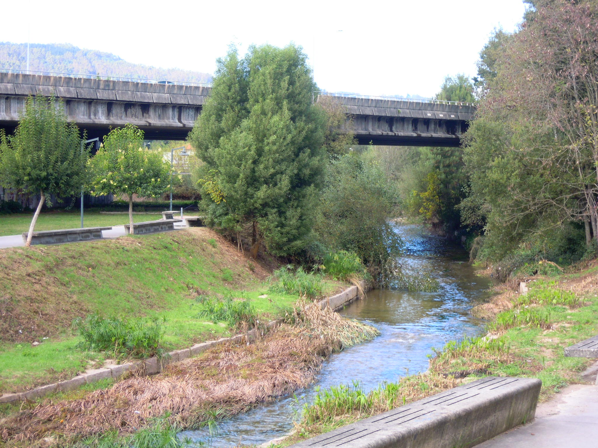 Río Louro ao seu paso polo Porriño, baixo a ponte da A-55.